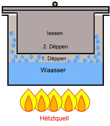 Prinzip vum Bain-Marie